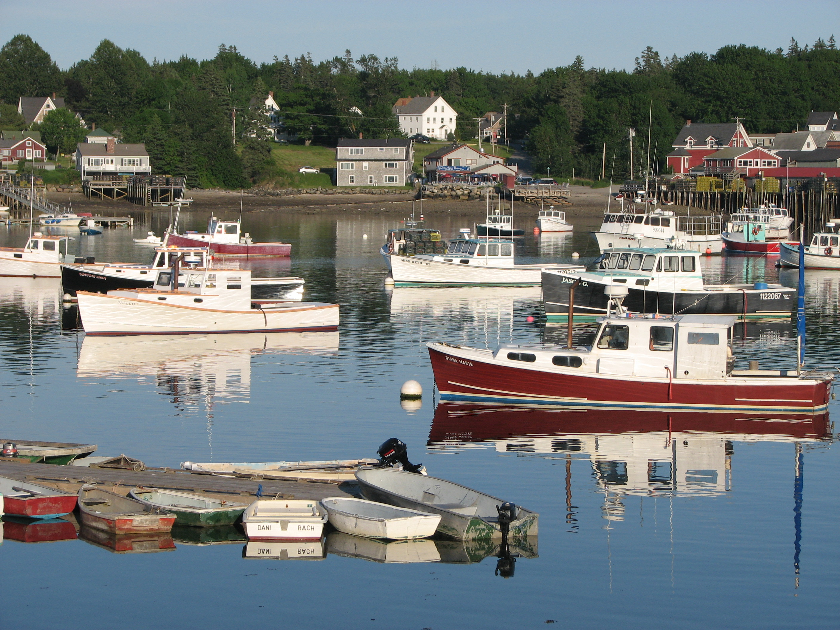 Port de Bass Harbor, sur l'île de Mount Desert Island (Maine)